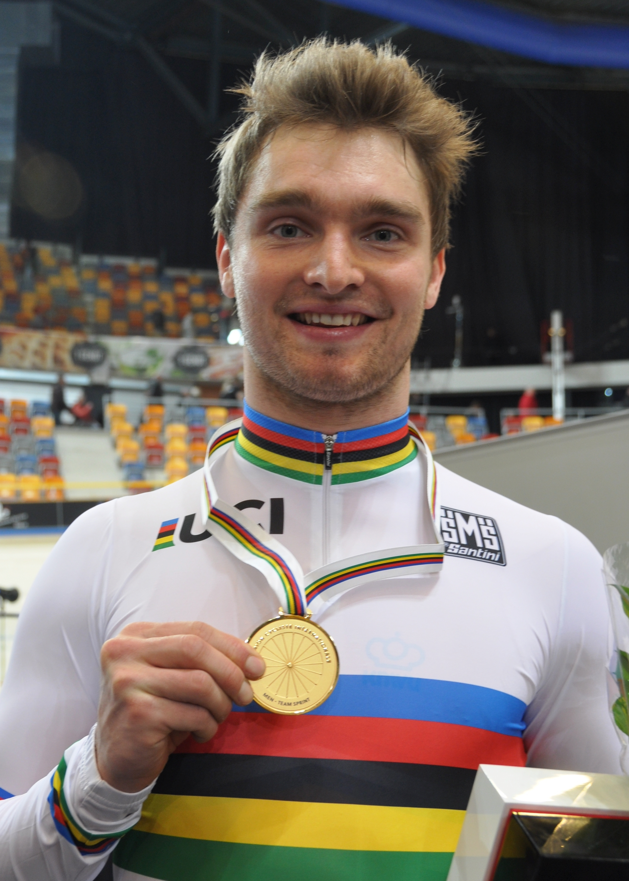 Matthijs Büchli, niederländischer Radsportler, Weltmeister im Teamsprint